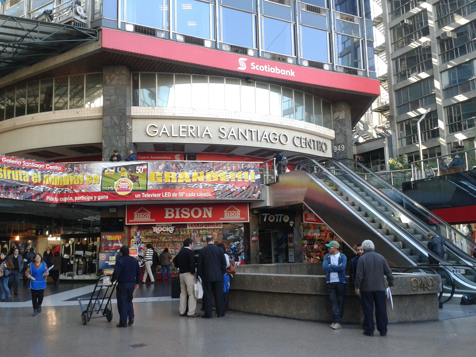 Galería Santiago Centro, Santiago de Chile.